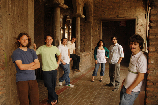 En segunda vuelta, NAU obtuvo el 51,38 por ciento de los sufragios. La lista de NAU,de izquierda a derecha: Martín Cáceres (2do secretario ejectutivo, Astronomía), Francisco Pinochet (1er secretario ejecutivo, Agronomía), Roberto Sagredo (candidato a consejero superior no electo), Nicolás Valenzuela (secretario general, Arquitectura), Lyssue Quiroga (2do vice presidente, Psicología), Miguel Crispi (presidente, Sociología) y Jorge Leyton (1er vice presidente, Derecho). Foto